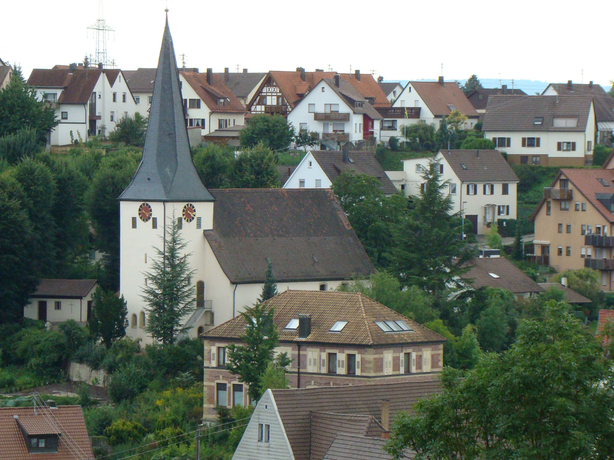 Blick zur Evang. Kirche in Talheim (Lkr. Heilbronn), davor das ehemalige ev. Schulhaus.